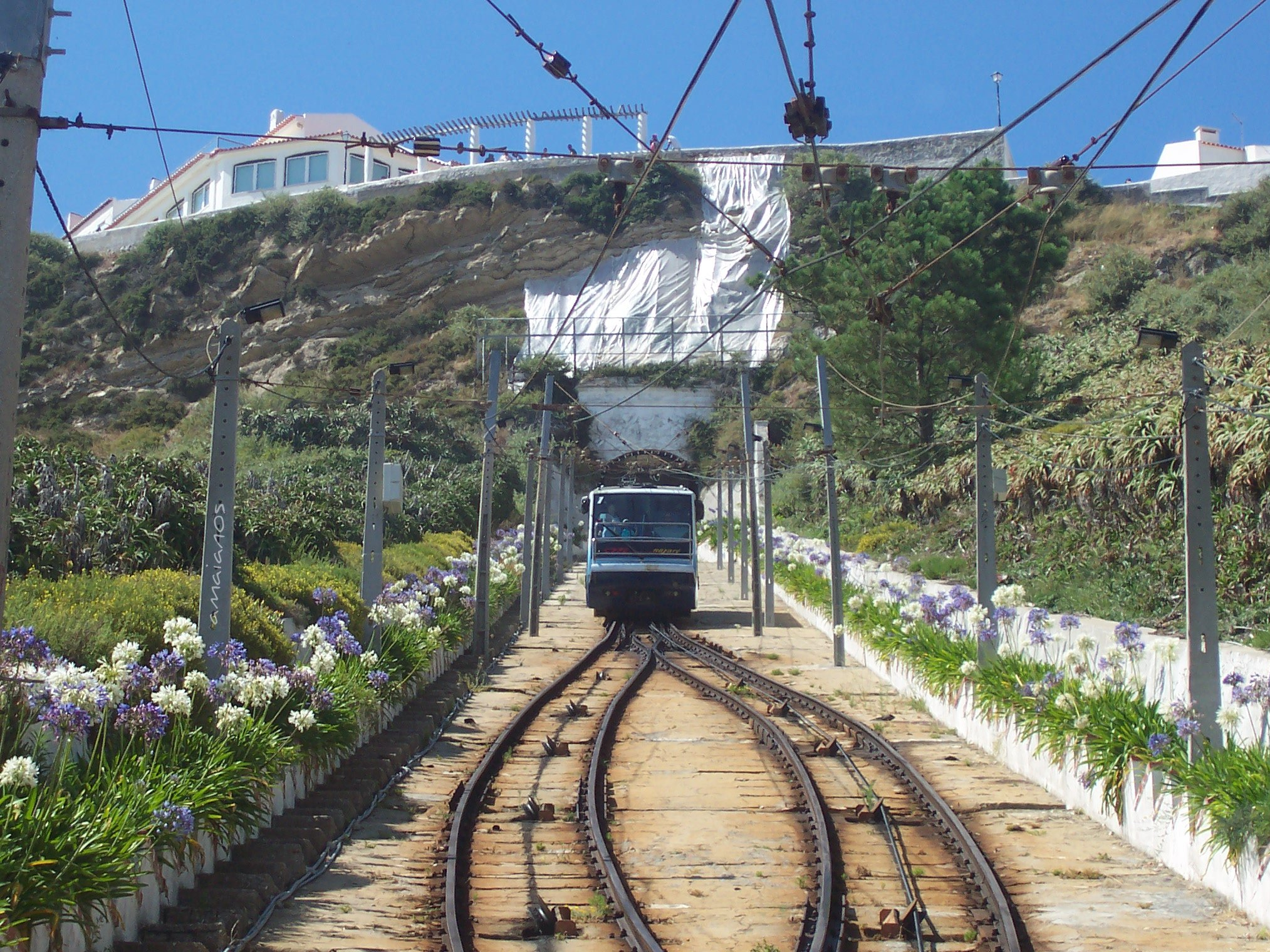 Nazaré